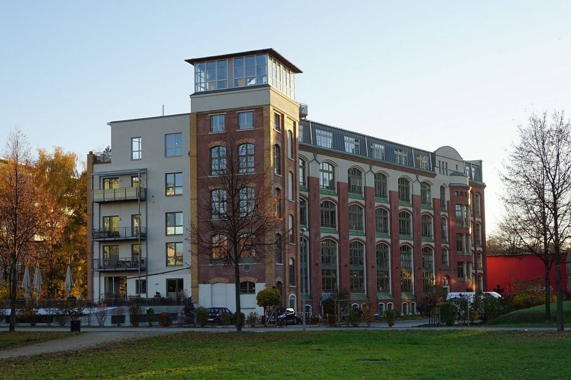 Das Wohn- und Geschäftshaus "Jansen-Fabrik" in Chemnitz, 2015